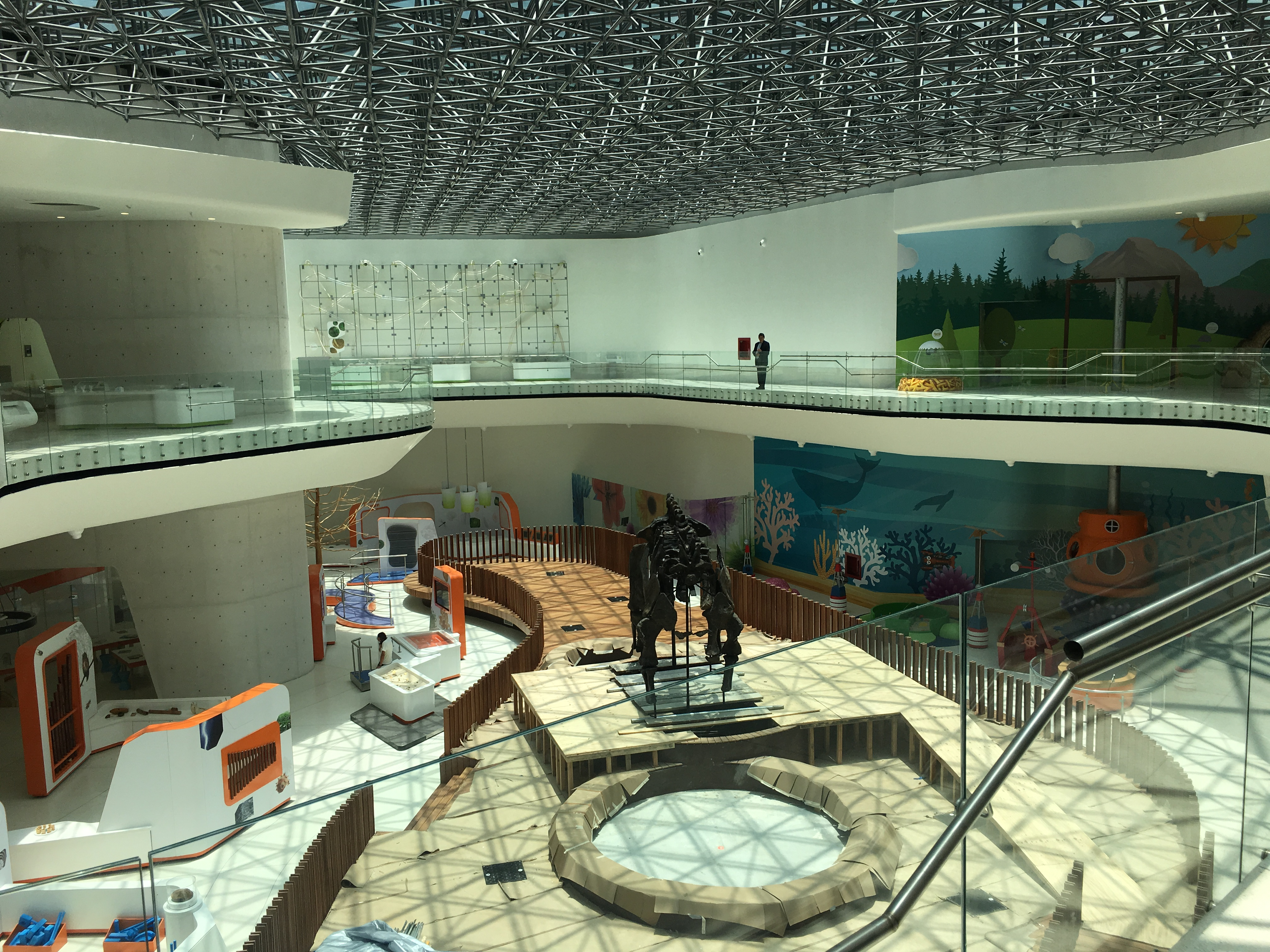 Papalote Museo del Niño en Monterrey cuenta con 74 exhibiciones.